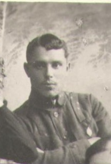 Загін самооборони села Святогорівка на чолі зкомандиром Тремба І. Т. . (1918)